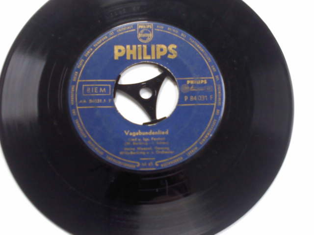 Single Vagabundenlied from Heinz Woezel, 1955